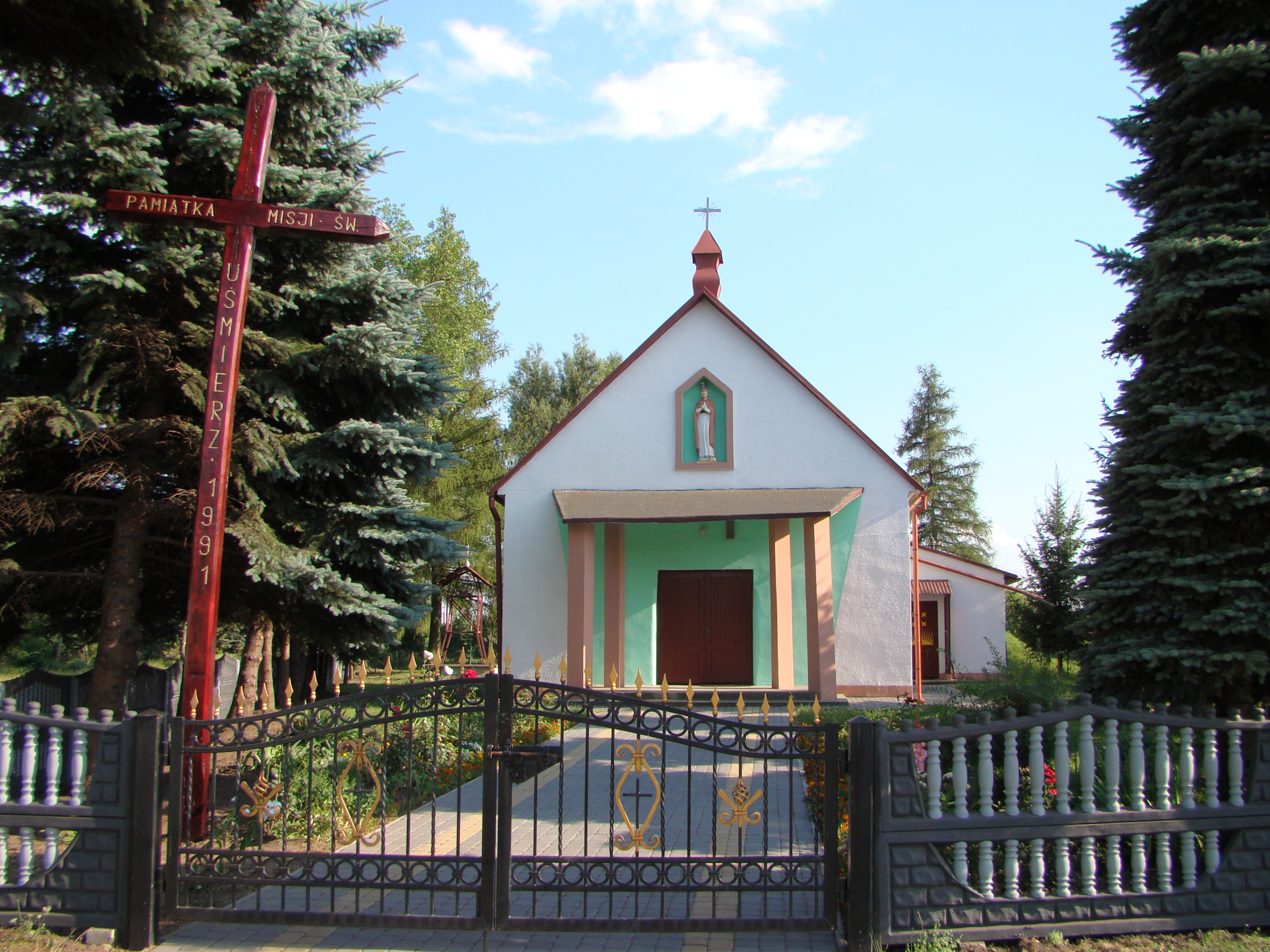 Kościół filialny parafii św. Barbary w Oszczowie - pw. św. Stanisława Kostki z 1983 r, kryty blachą, przyłączony z parafii Hulcze.